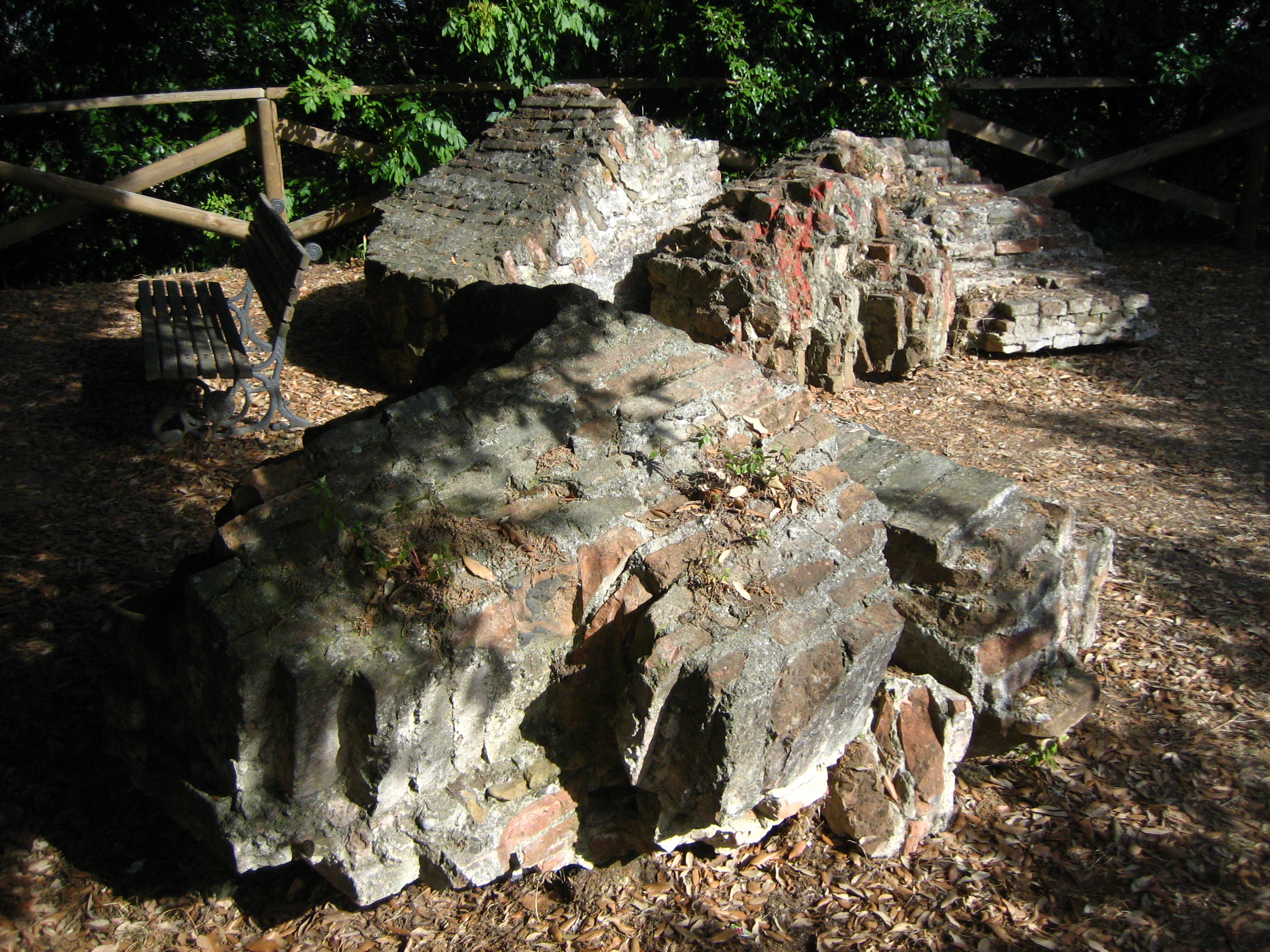 Area archeologica del Poggio della Rocca This is a photo of a monument which is part of cultural heritage of Italy.